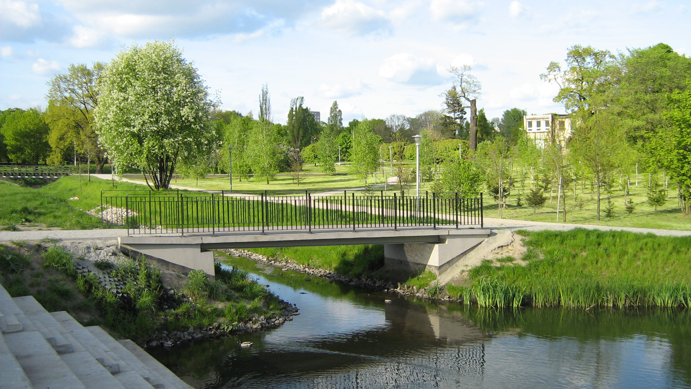 Rzeka Łódka w Parku Ocalałych w Łodzi